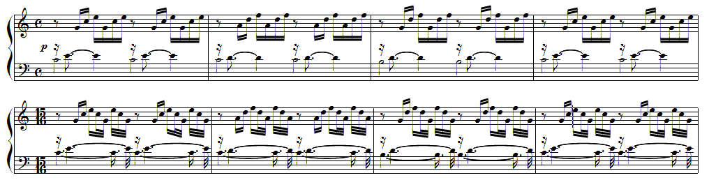 Bach prélude version à 15 temps par Alexandre Astier